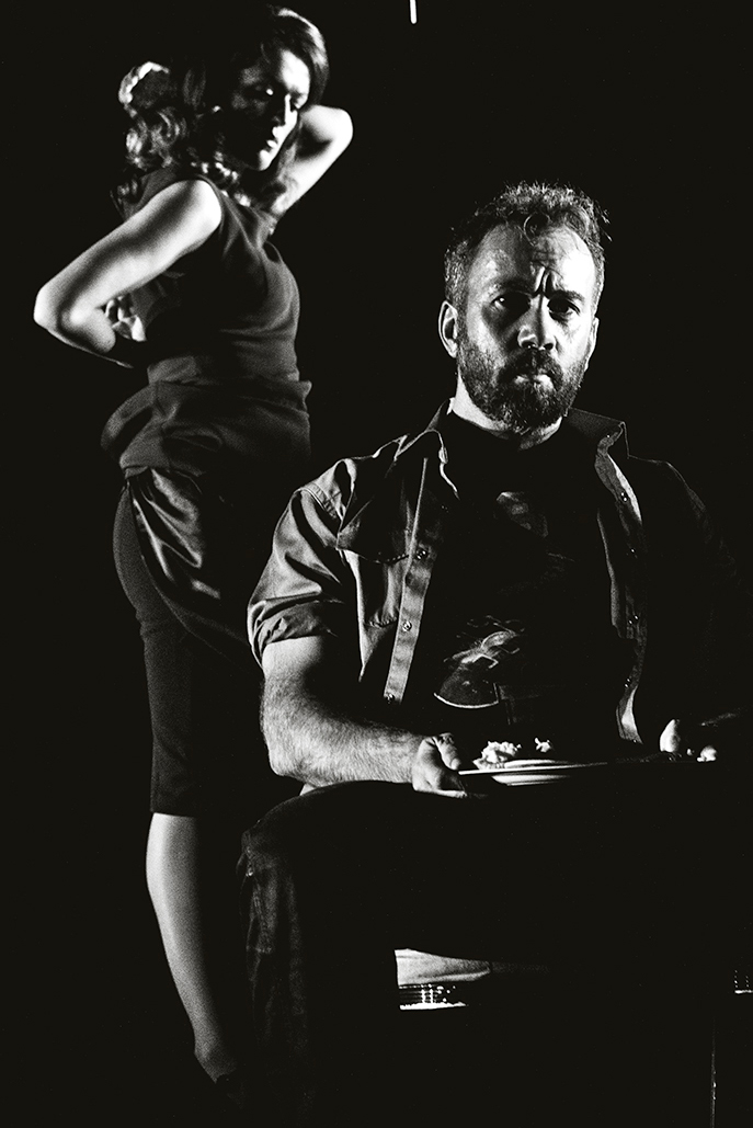 A New Opera by Donnacha Dennehy and Enda Walsh Edinburgh International Festival André de Ridder Conductor